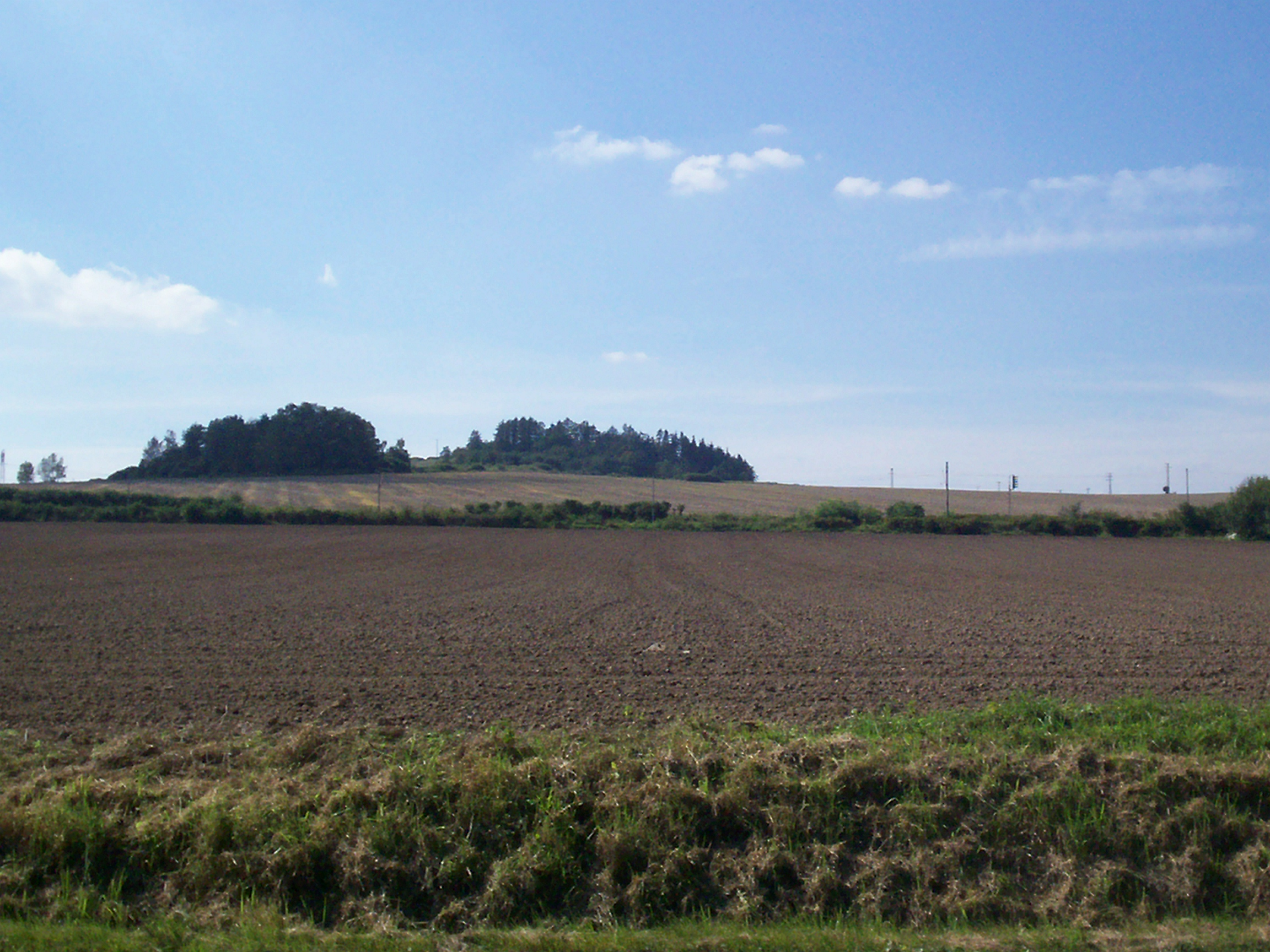 Vrch Rohatá v Blovicích v pohledu z blovického hřbitova.